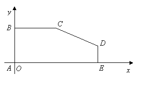 п'ятикутник